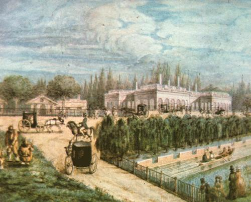 Óleo del artista Carlos Sívori ilustrando la casona del Gobernador Juan Manuel de Rosas en la zona de Palermo, en Buenos Aires. Vista desde la actual Avenida Sarmiento, por donde corría un estanque artificial.